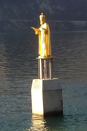 Statua di San Nicolò